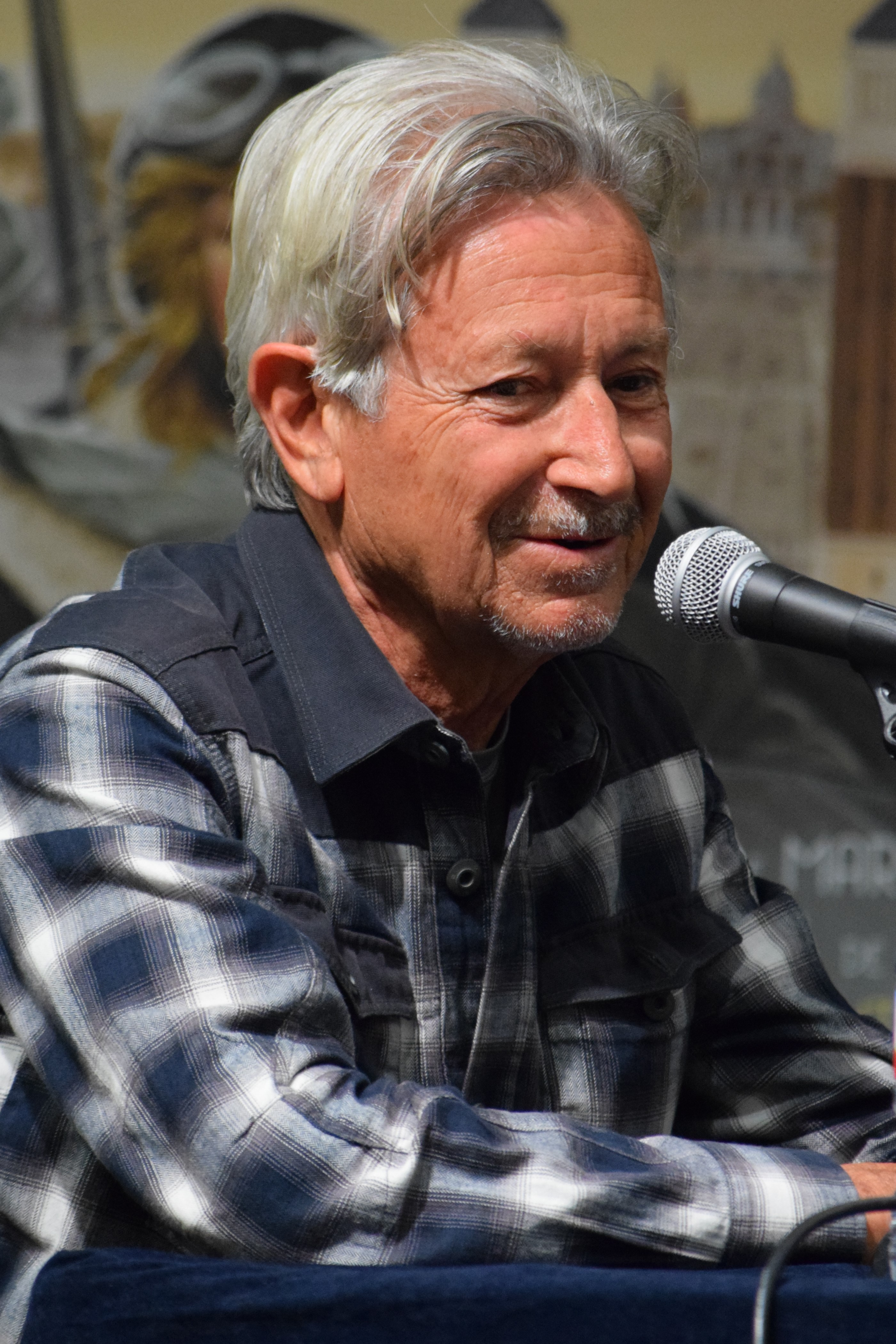 El dibuixant Kim presentant el còmic El ala rota, el qual fou nominat al premi a la millor obra. Saló Internacional del Còmic de Barcelona de 2017. Divendres 31 de març de 2017.